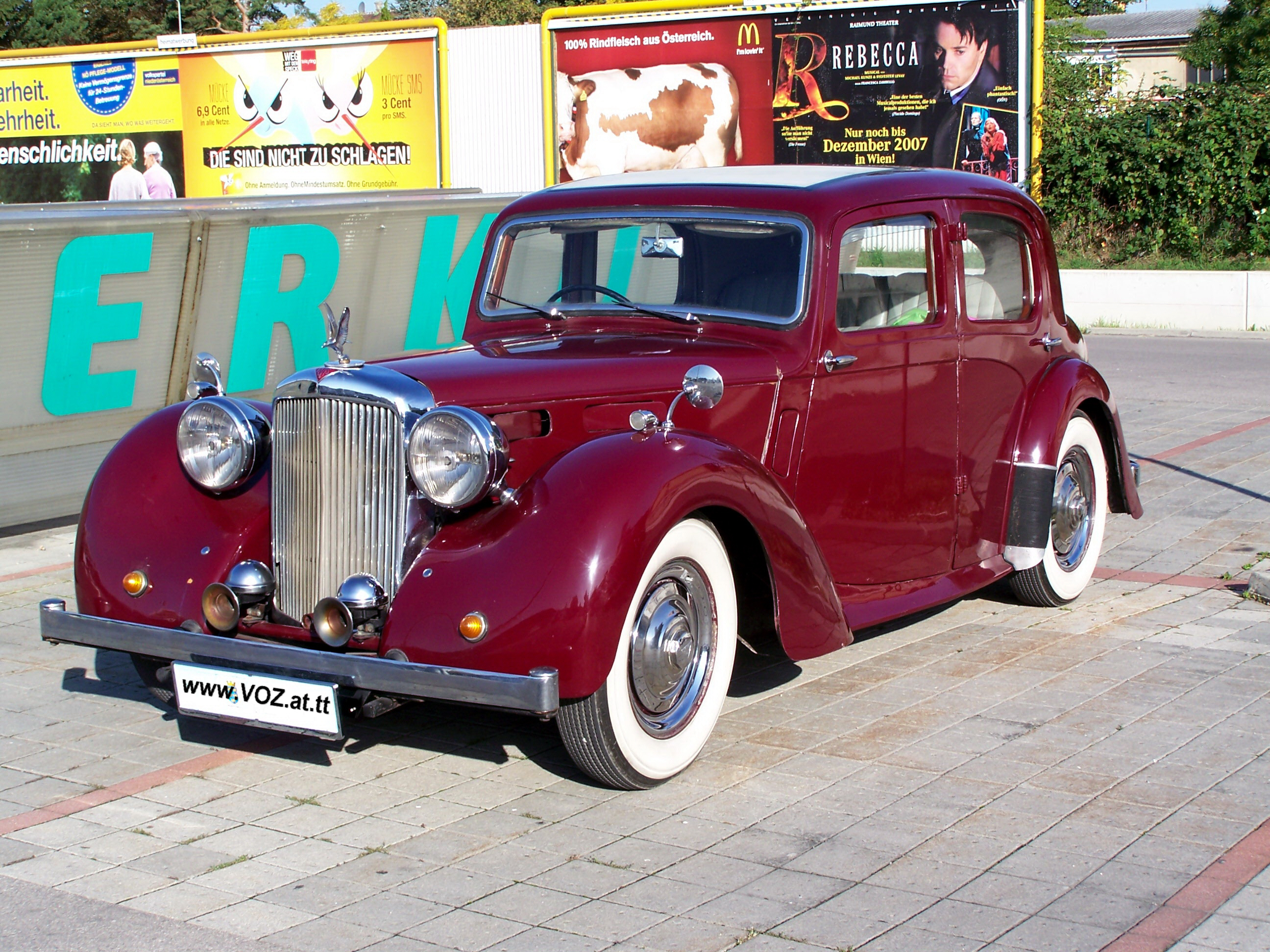 Alvis TA 14 Bj. 1948